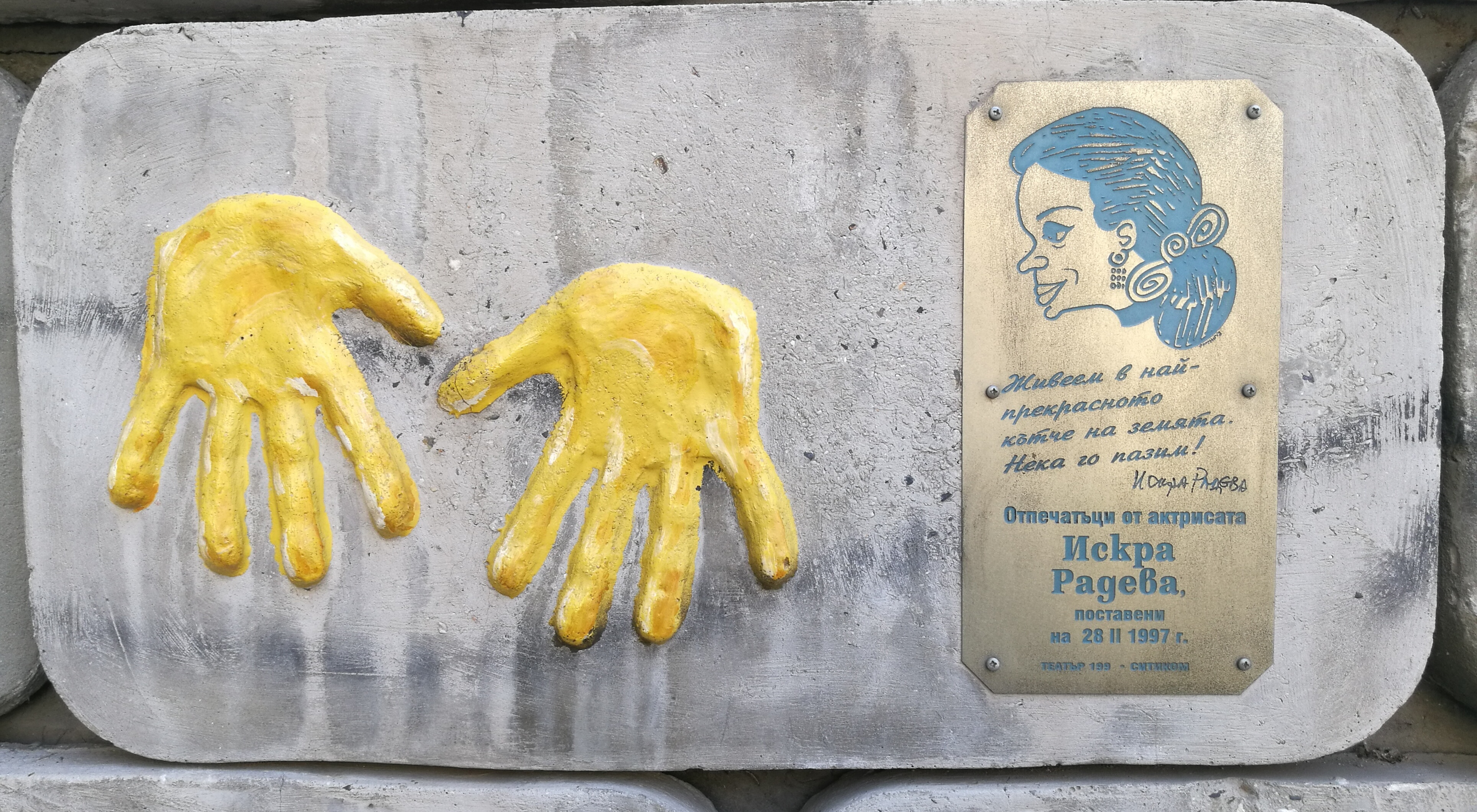 Стената на славата пред Театър 199 - пано с отпечатъци, послание и шарж на Искра Радева.